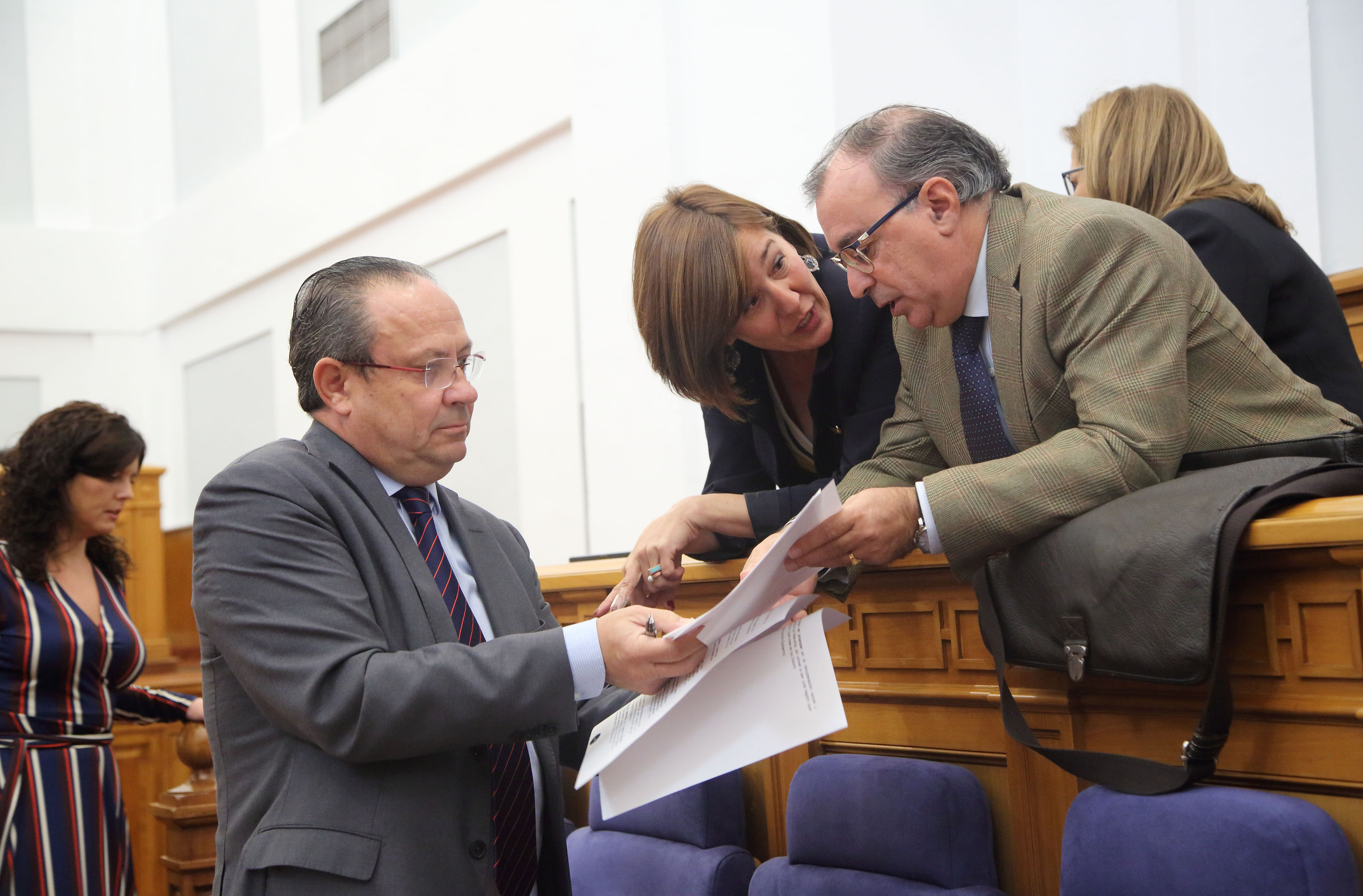 Toledo, 26-10-2017.- El consejero de Hacienda y Administraciones Públicas, Juan Alfonso Ruiz Molina, conversa con los diputados, Emilio Sáez y Blanca Fernández, en el Pleno de las Cortes regionales celebrado hoy en Toledo. (Foto: Álvaro Ruiz // JCCM)